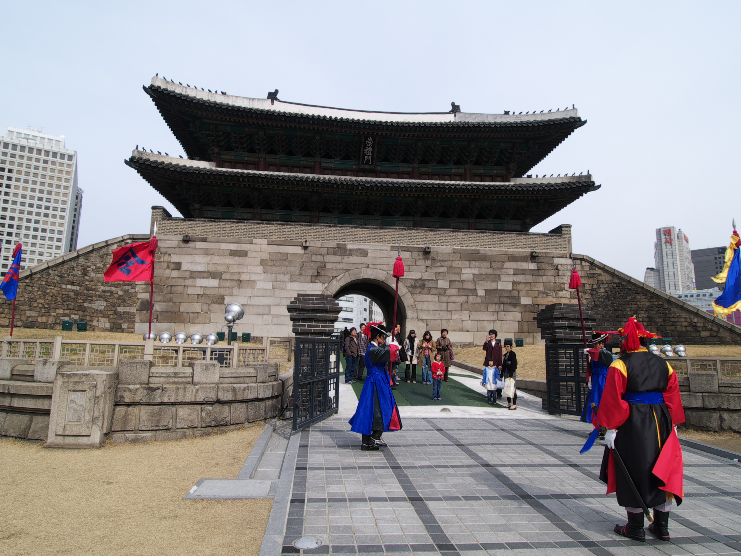 Sungnyemun or Namdaemun, Seoul